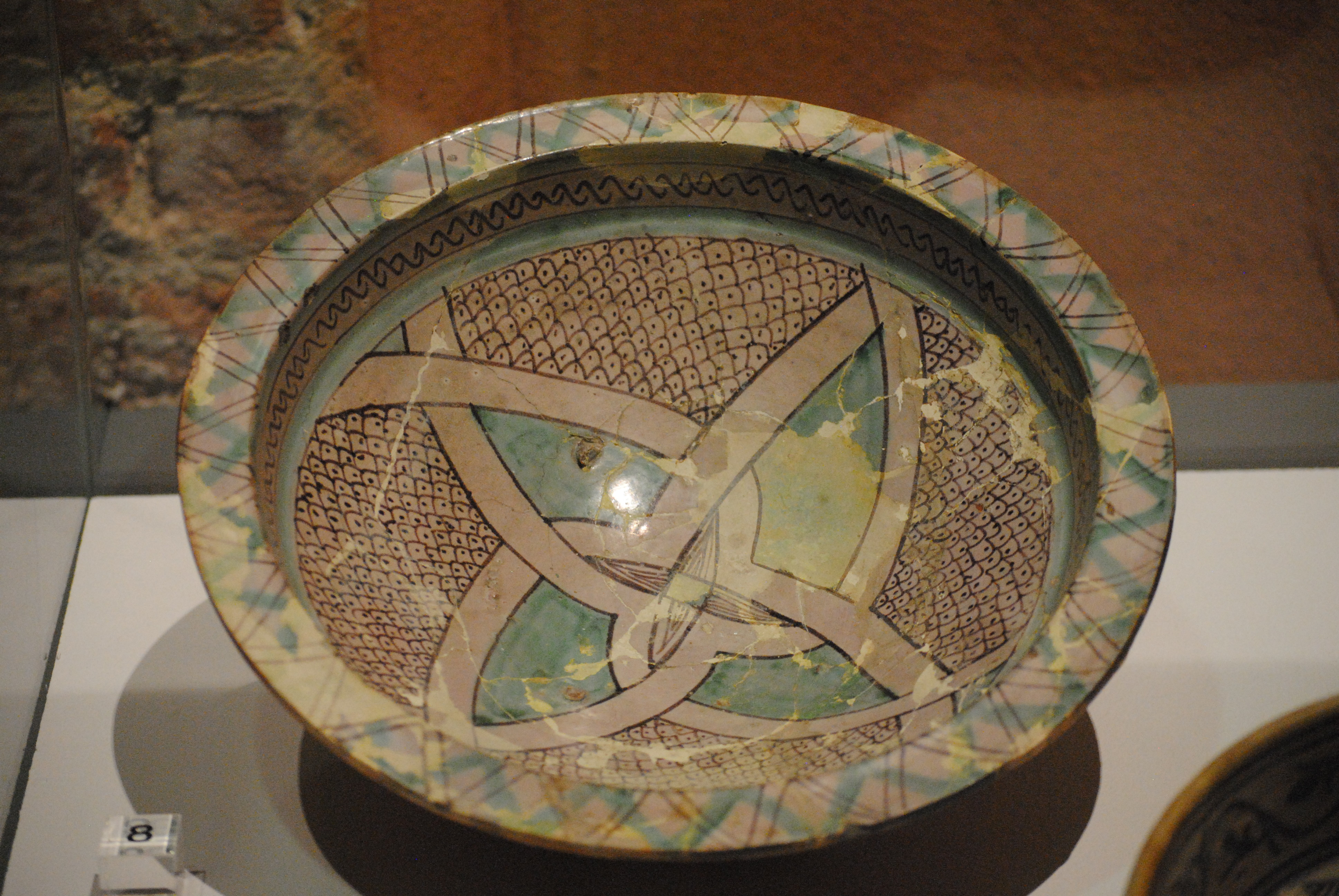 Catino inmaiolica arcaica di Pisa usato come bacino ceramico - fabbricato tra la fine del XIII - inizi del XIV secolo (chiesa di San Martino, Pisa) - Museo Nazionale di San Matteo.